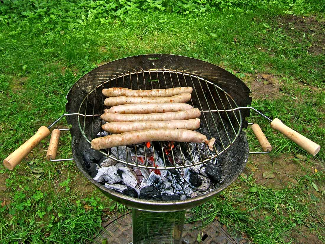 Remstäler Wikipedia-Familien-Grill-Stammtisch am 22.ß.2009 in Baach